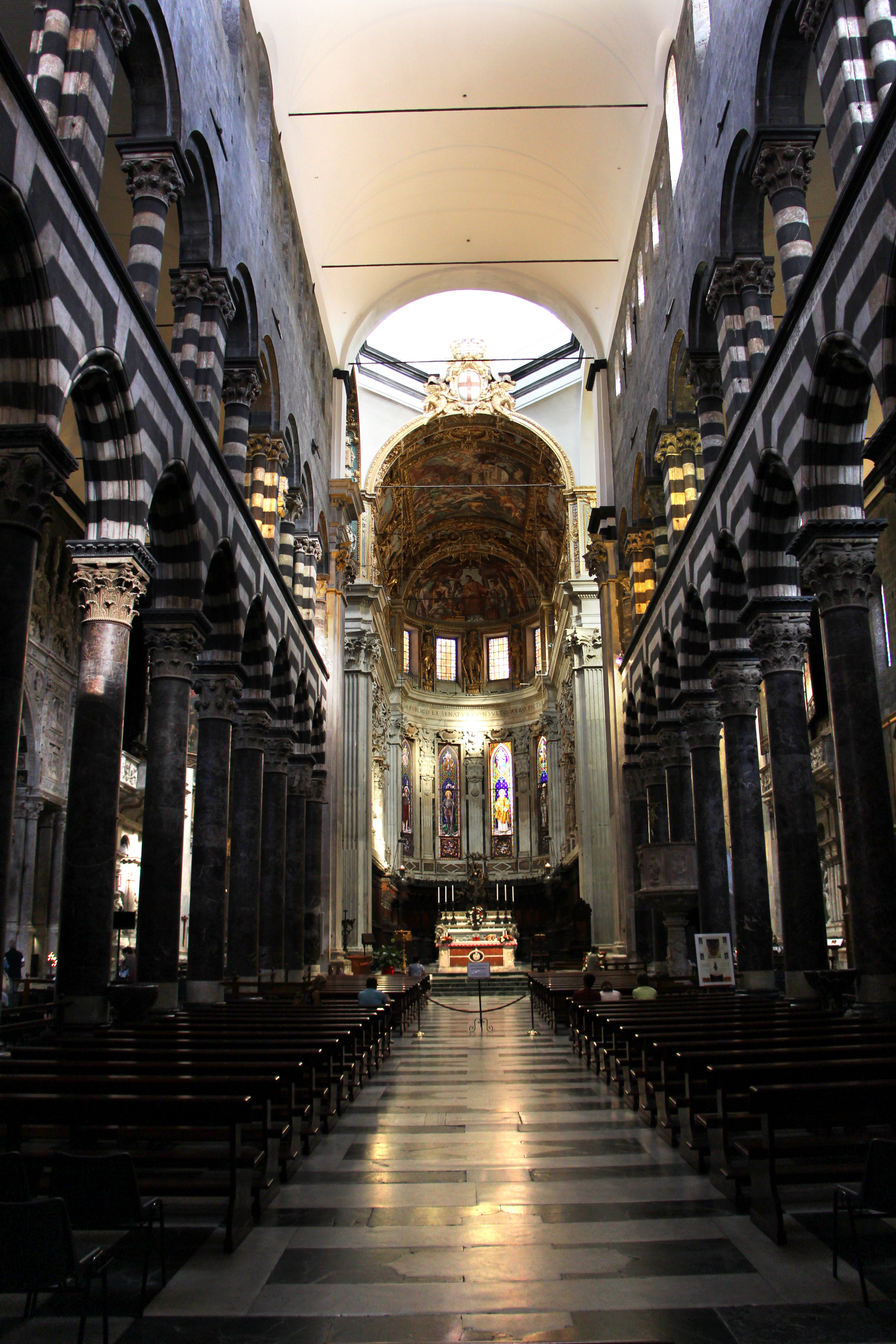 Genova The making of this document was supported by Wikimedia CH. (Submit your project!) For all the files concerned, please see the category Supported by Wikimedia CH.